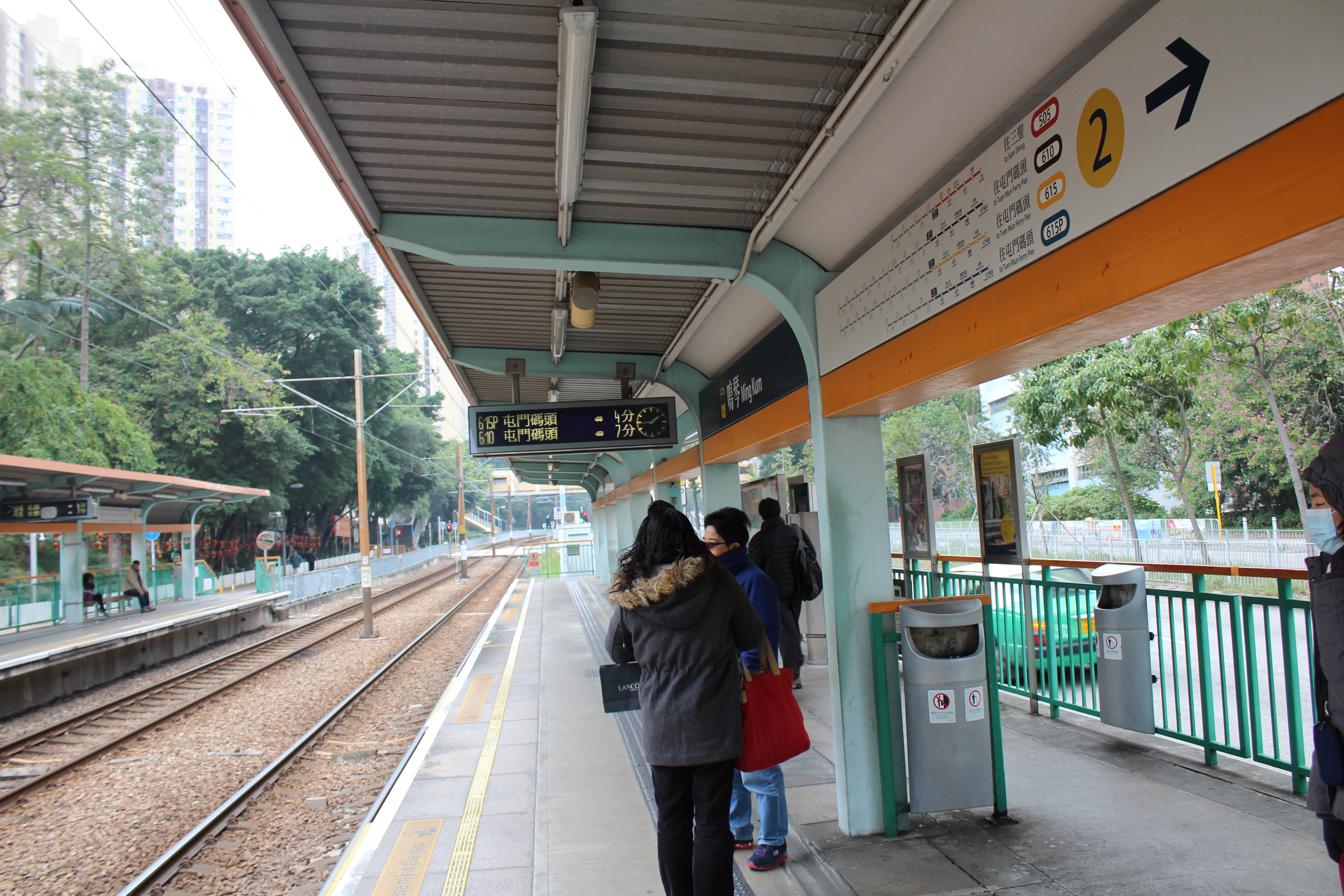 鳴琴站2號月台